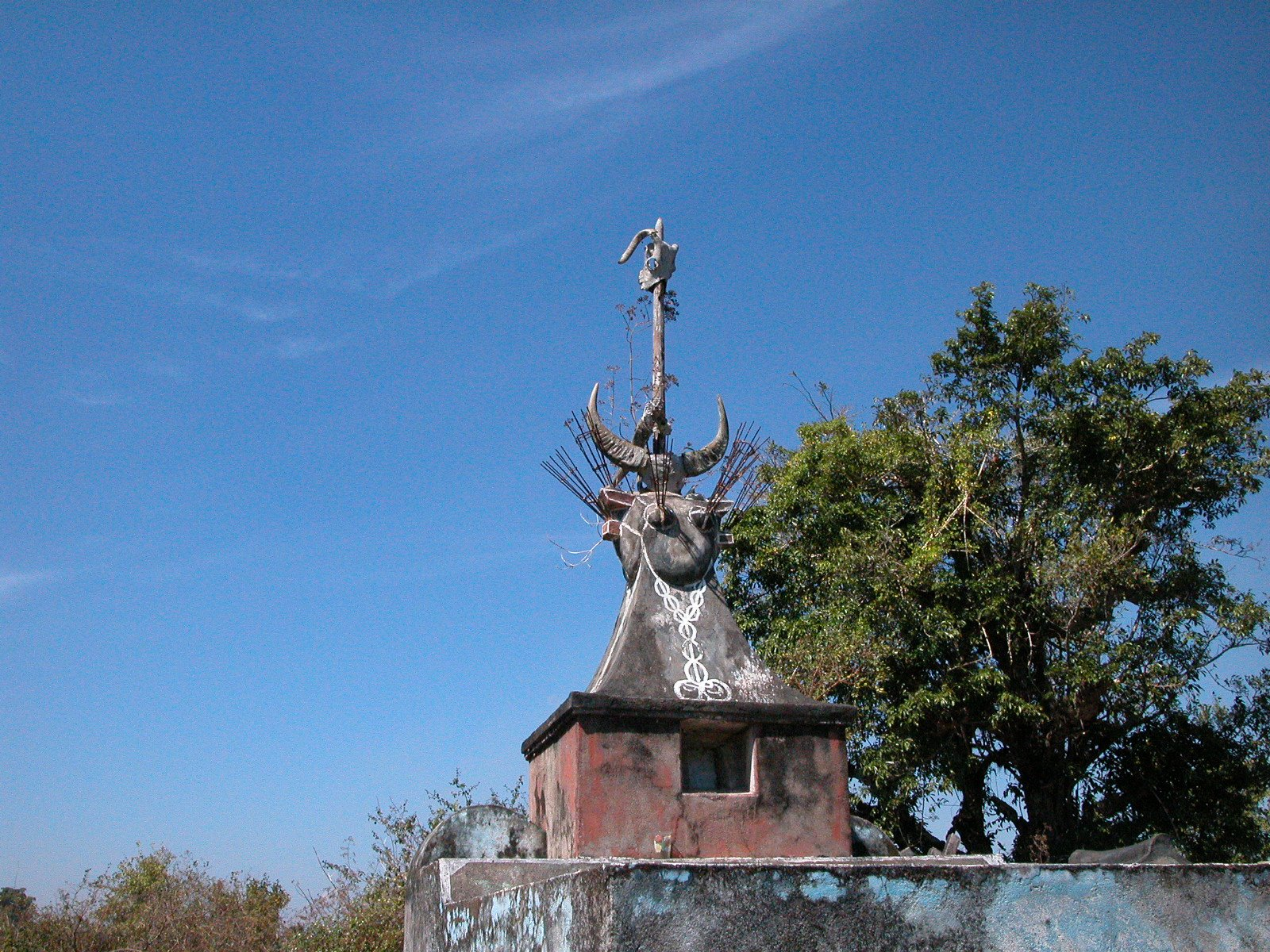 Mahnmal an der Straße zwischen Com und Lospalos